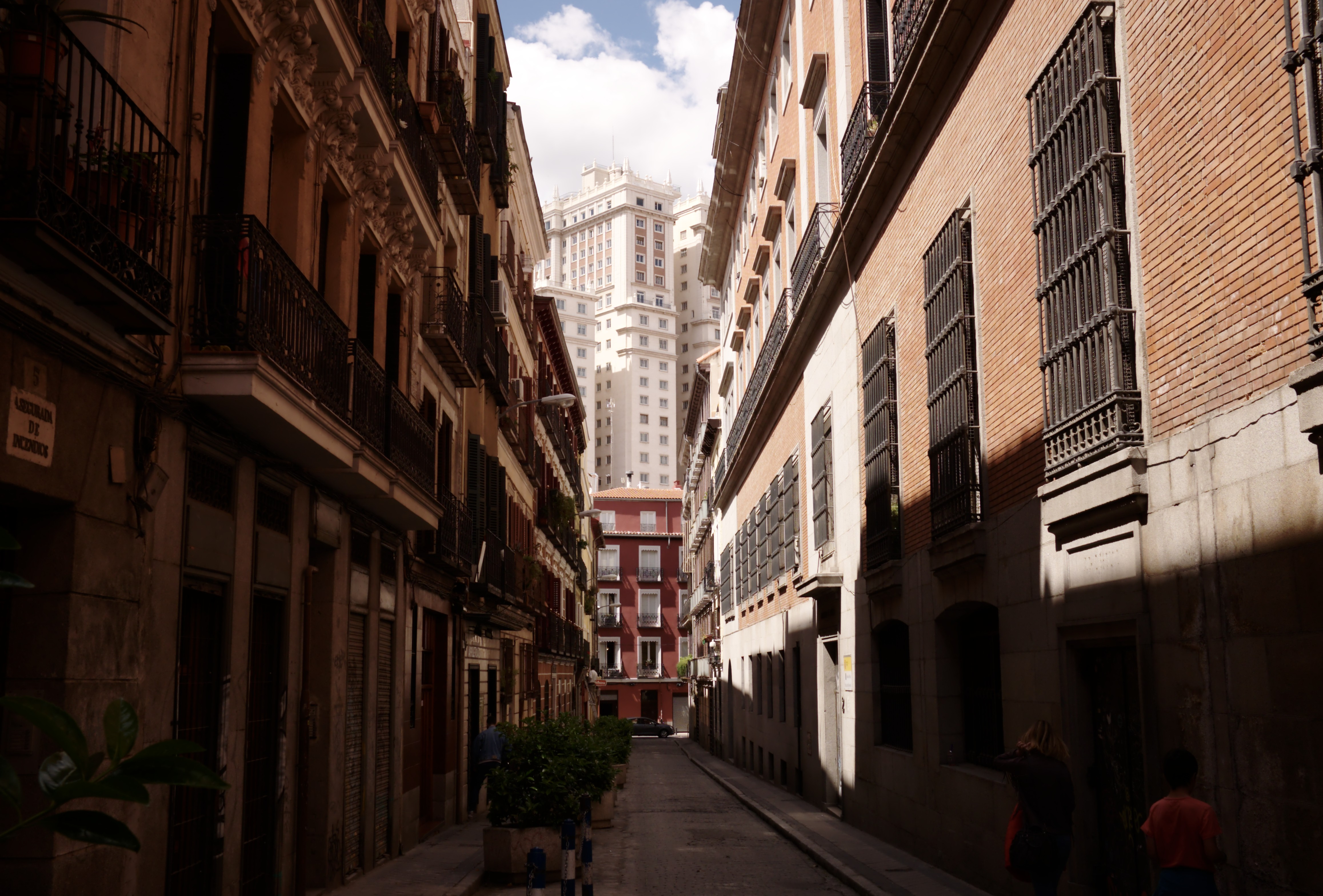 Calle de la Manzana